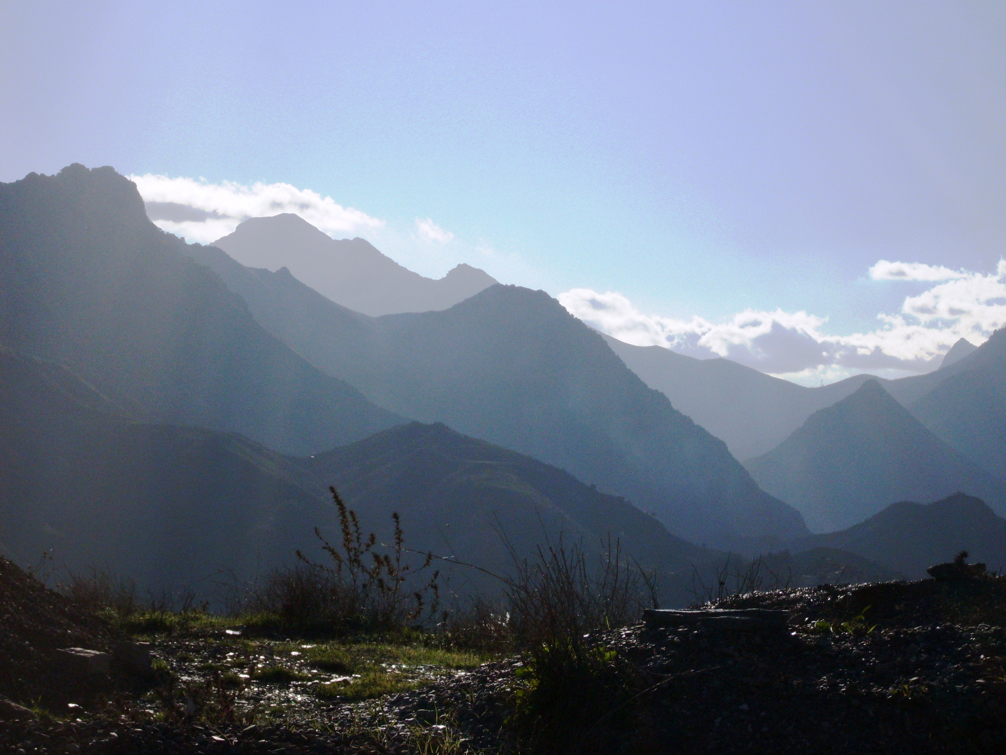 Vue sur Jerjer depuis Tacekkirt At Bu Yusef